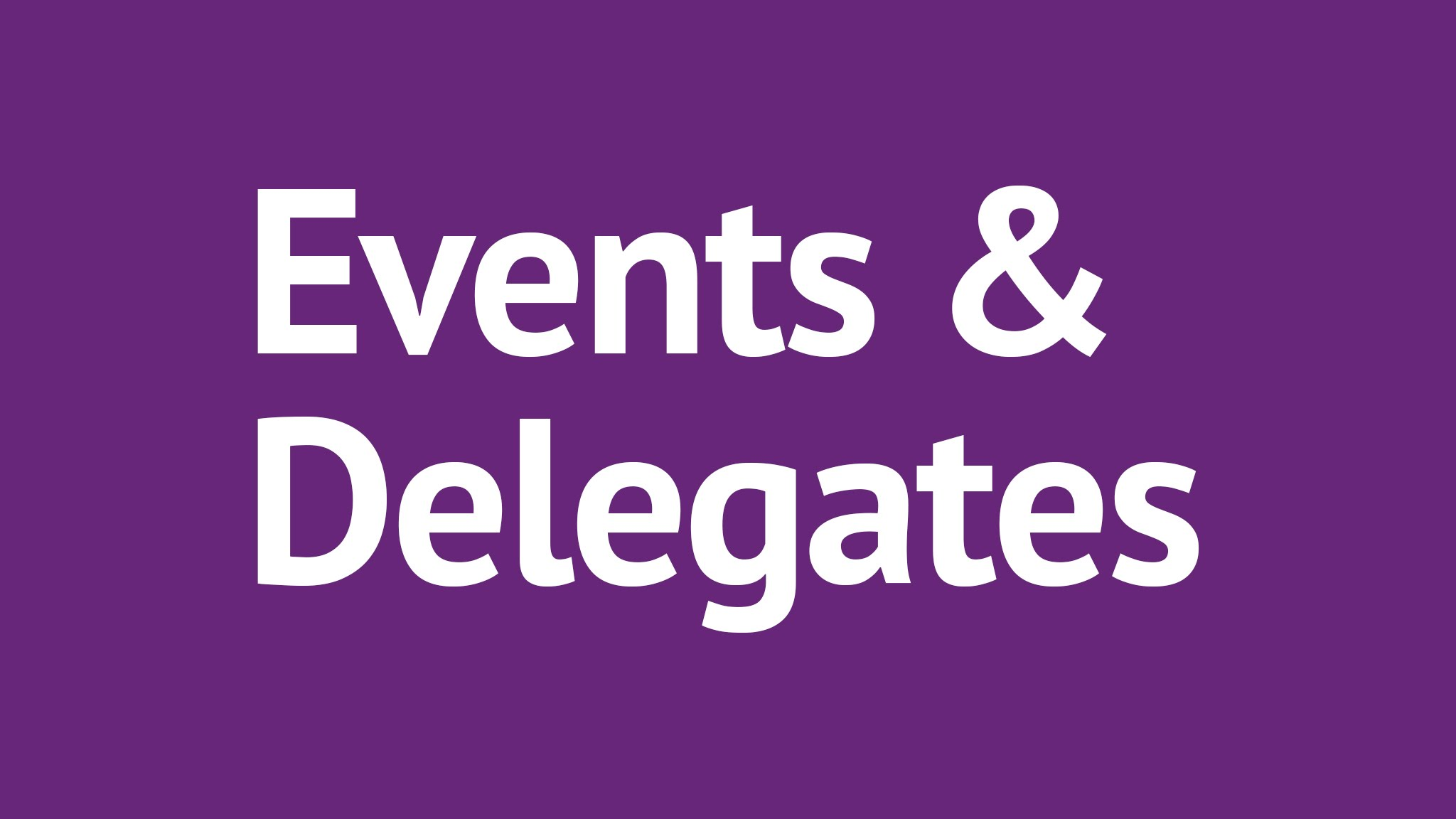 event